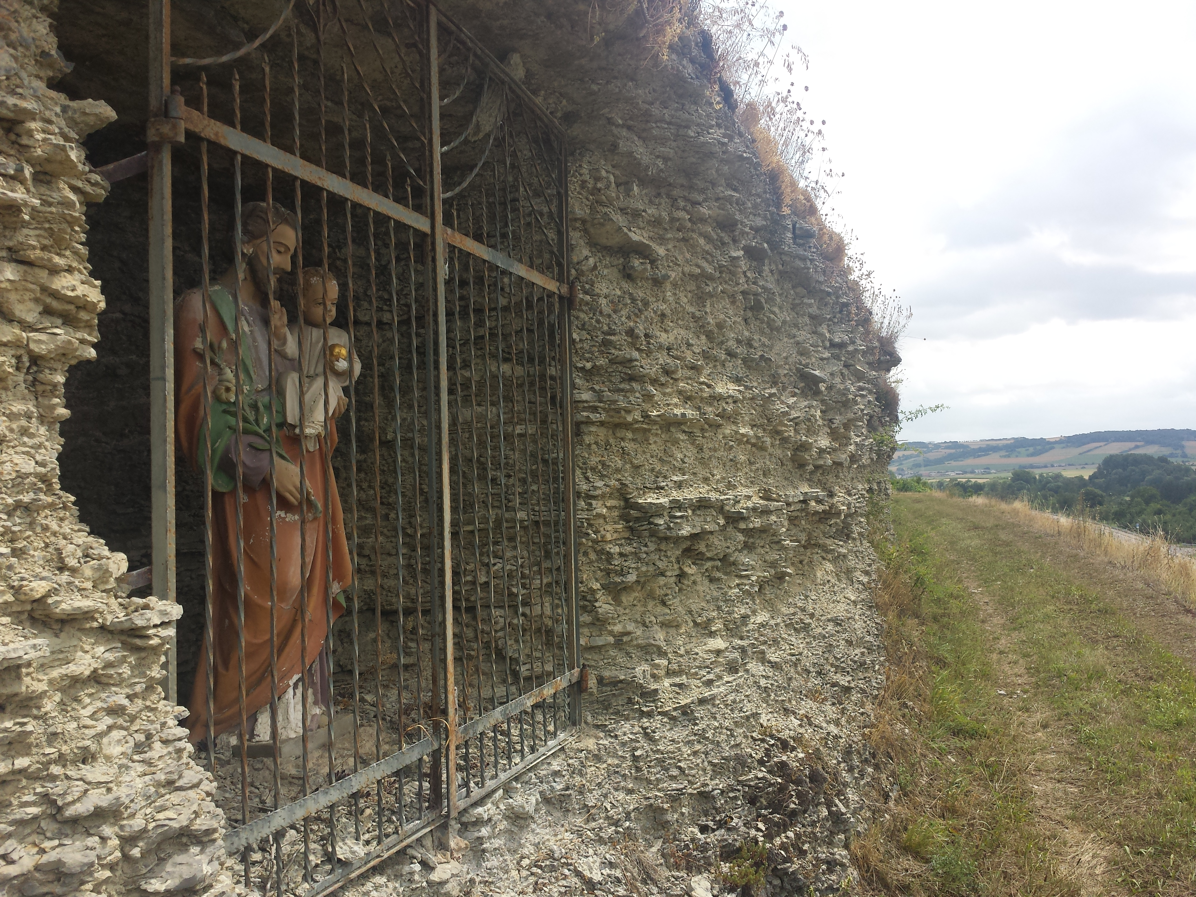 Der Jakobsweg Main-Taubertal bei Markelsheim.